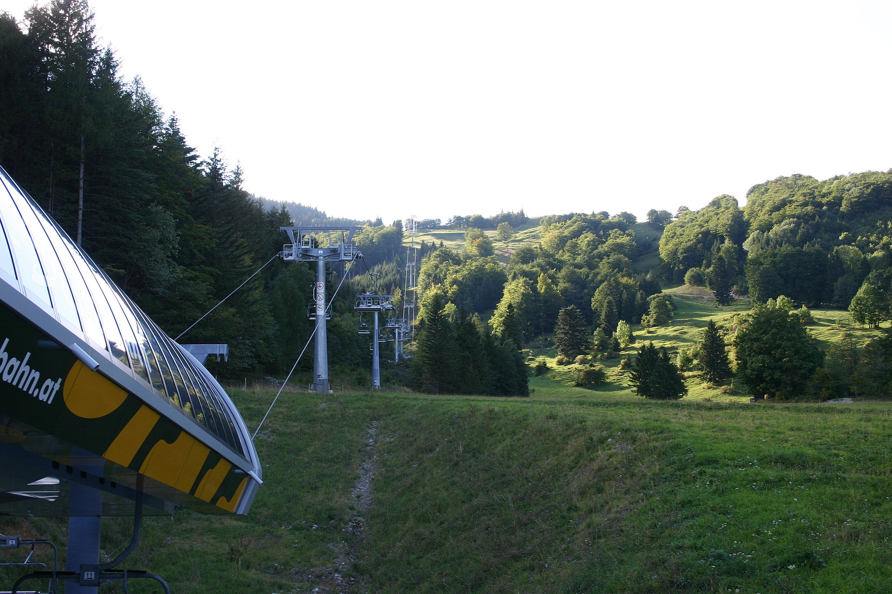 Puchberg am Schneeberg – Vierer-Sesselbahn im Ortsteil Losenheim. Blick zum Fadensattel.